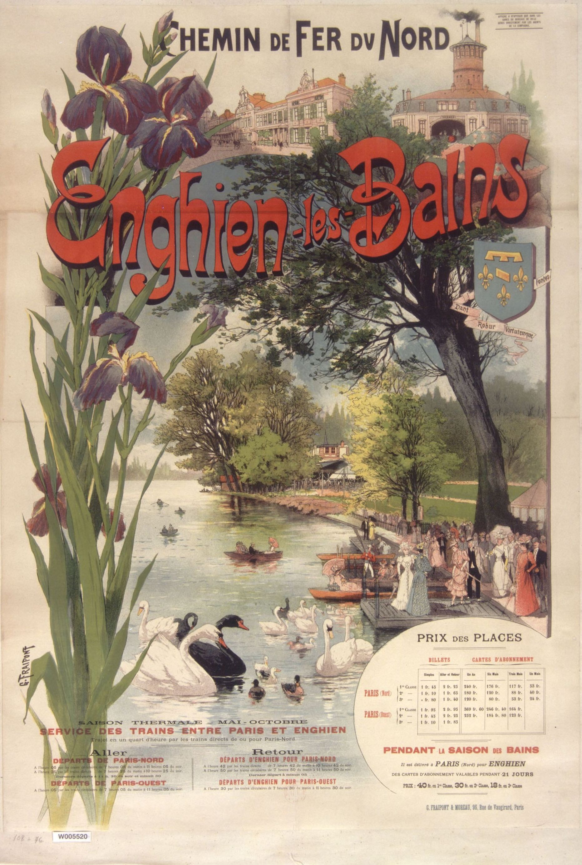 Chemin de fer du Nord. Enghien-les-Bains, Val-d'Oise, France. Lithographie, en couleur , 108 x 76 cm.